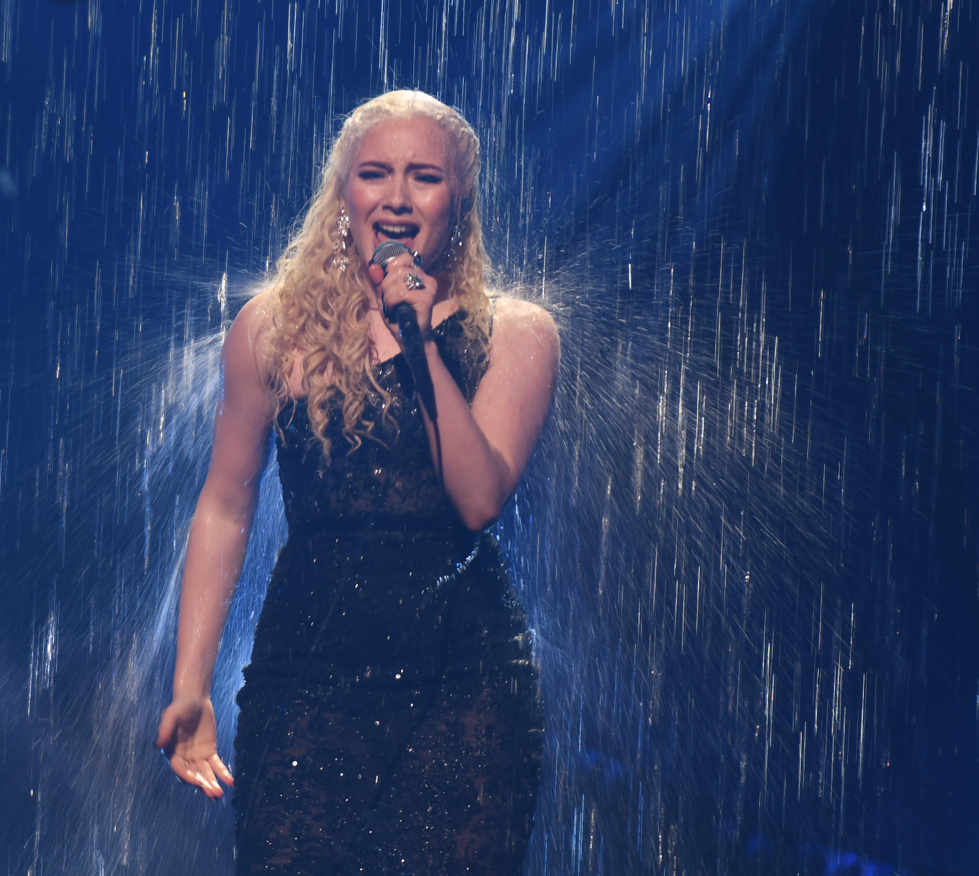 Melodifestivalen 2019, deltävling 1, Scandinavium, Göteborg, Wiktoria